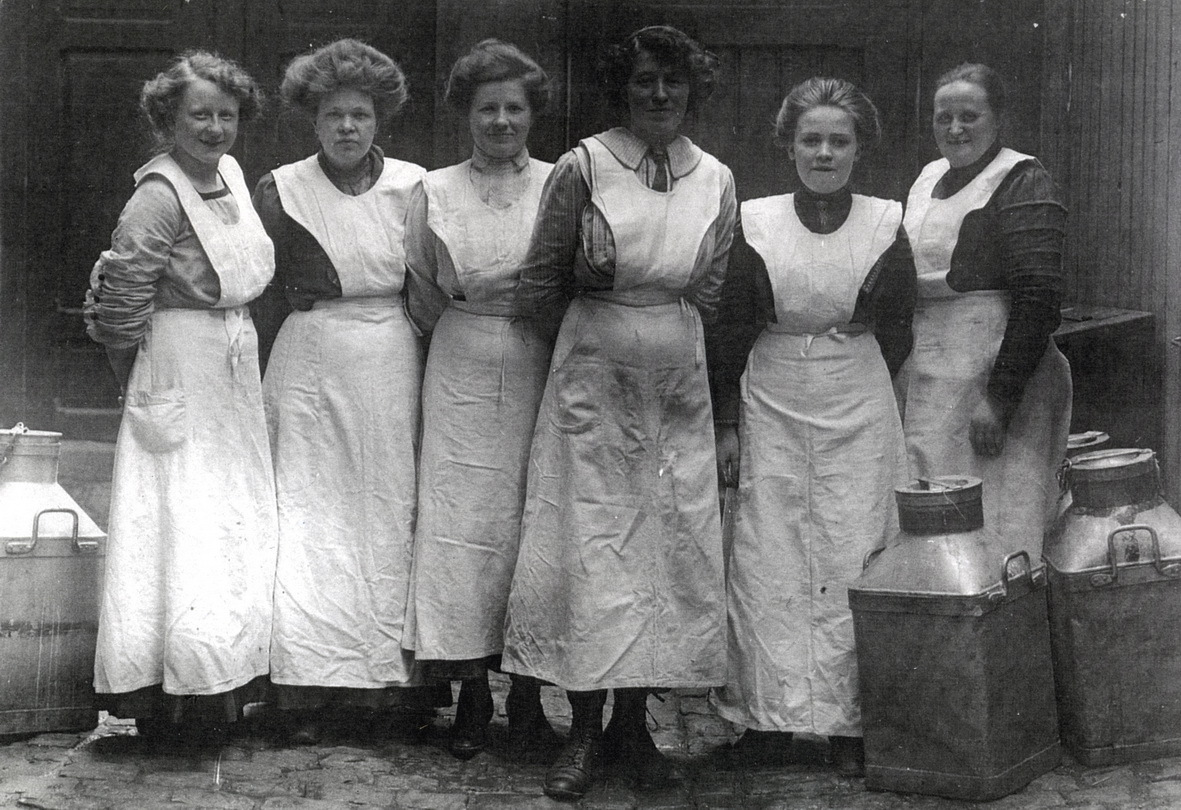 Butikkjomfruer i bakgården med melkespann fotografert i Torvbakkgaten, hjørnet Markvveien i Oslo omkring 1910. Fotograf ukjent. Oslo byarkiv A-10001 Ua 0006 055.